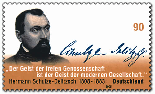 Sonderbriefmarke zum 200. Geburtstag des Politikers und Begründers des deutschen Genossenschaftswesens Hermann Schulze-Delitzsch (1808-1883)